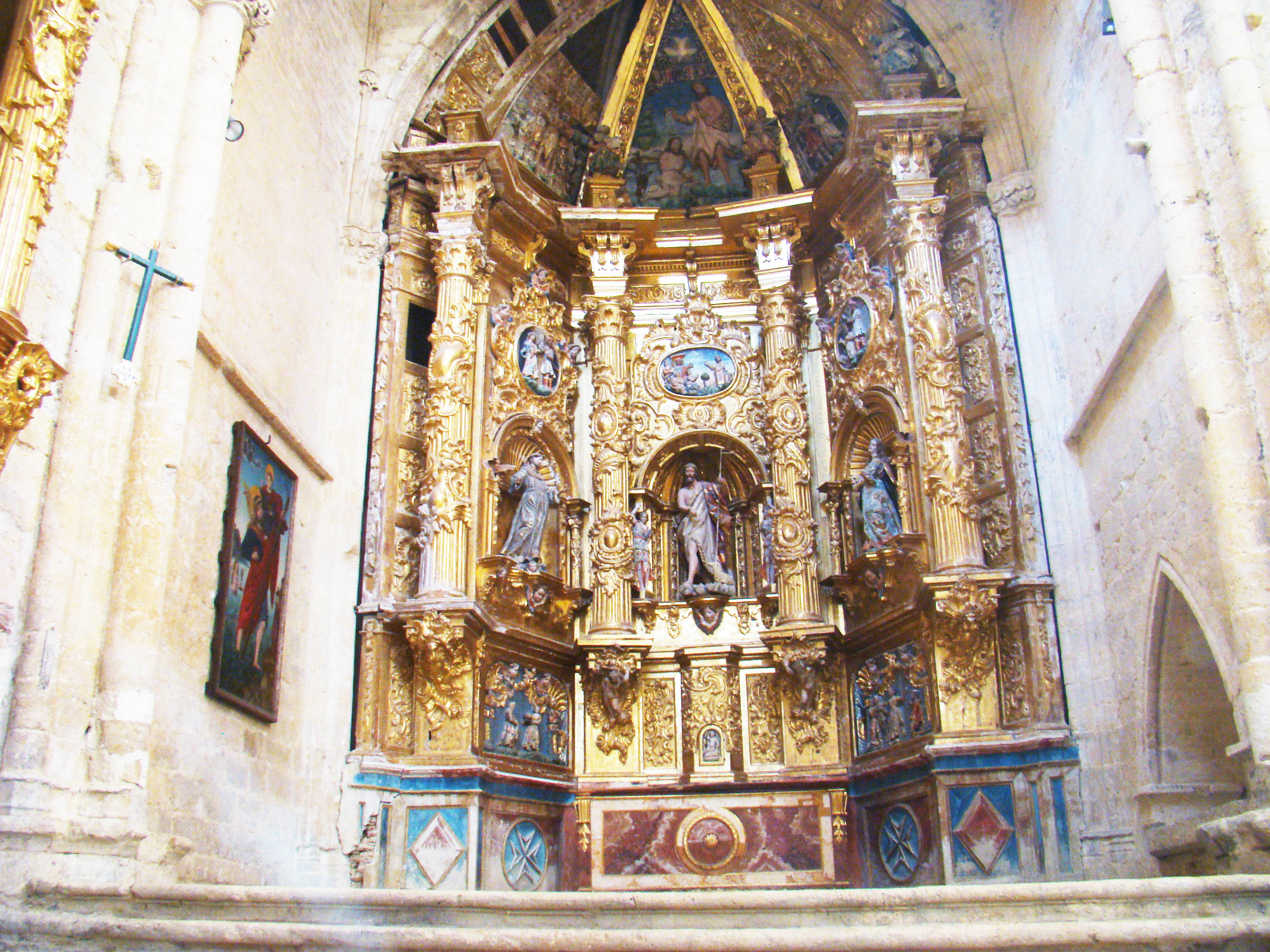 Iglesia de San Hipólito en Támara de Campos (Palencia, España). Retablo barroco de San Juan Bautista.